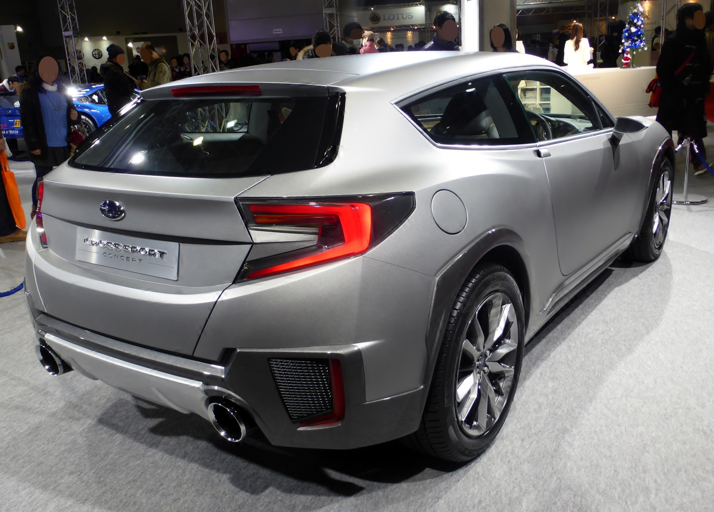 大阪モーターショー2013のスバルブースにおいてクロススポーツデザインコンセプトを撮影。